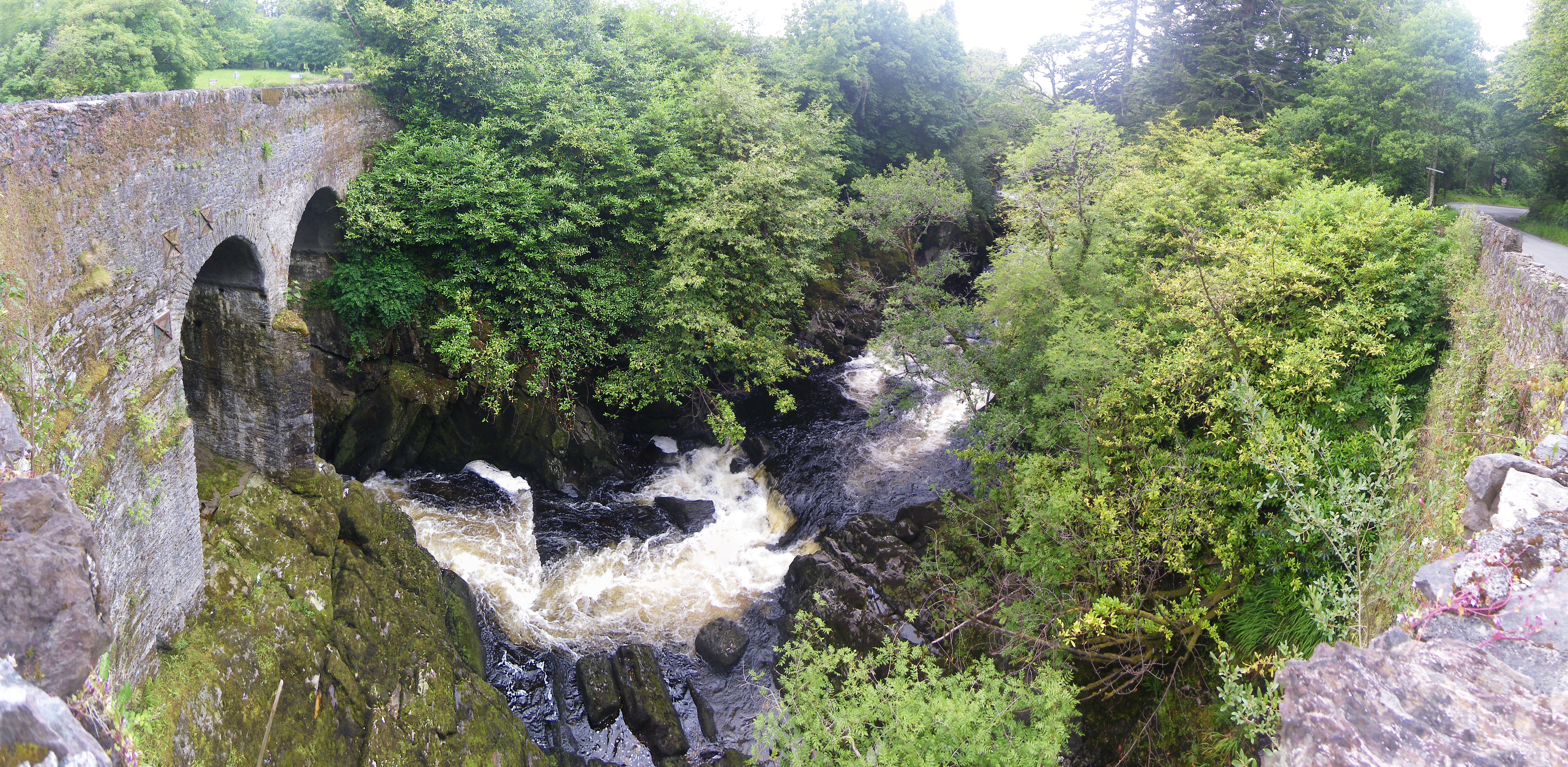 Pont sur la rivière Blackwater du Kerry, pres de l'embouchure